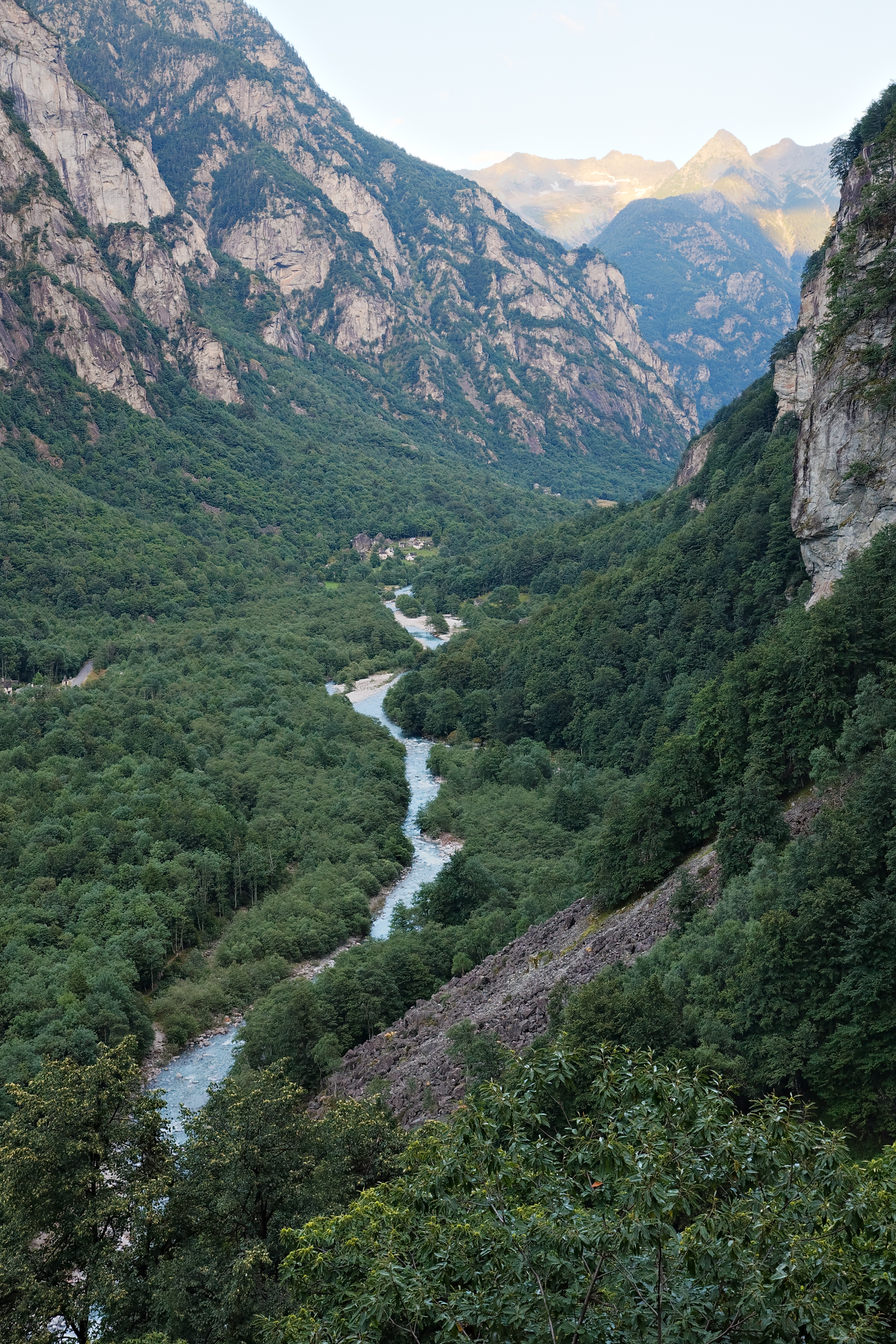 Das Bavonatal, von Foroglio gesehen